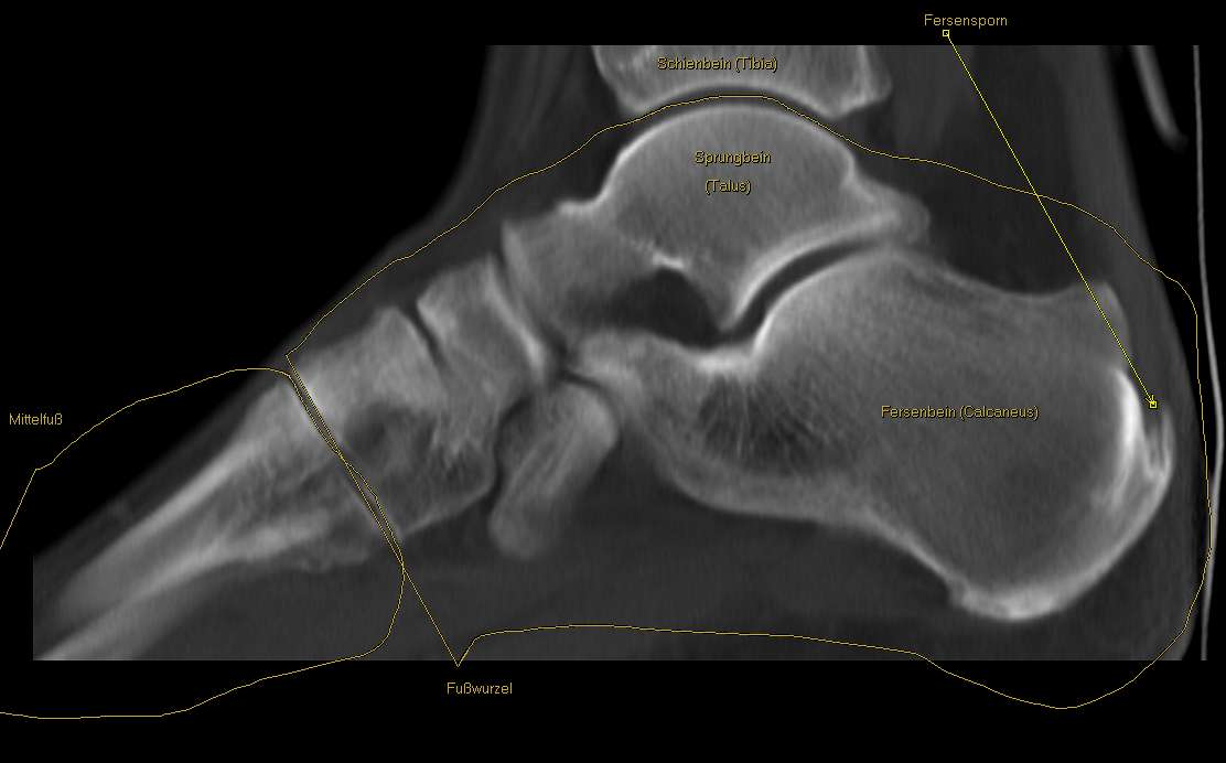 Röntgenbild einer Ferse seitlich mit Fersensporn